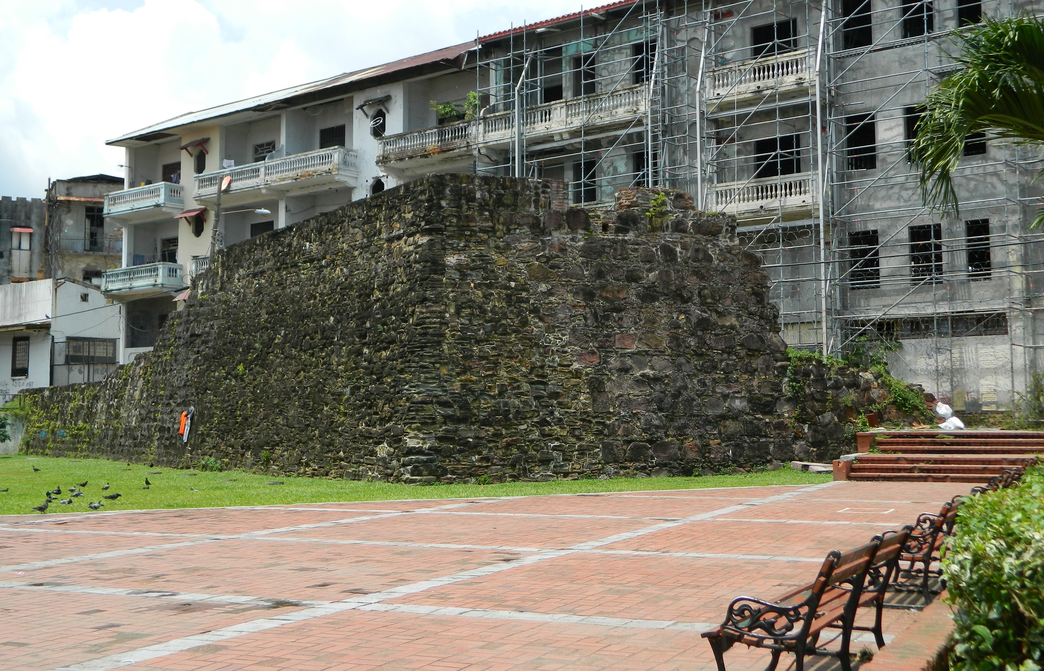 Ruinas Baluarte Mano de Tigre